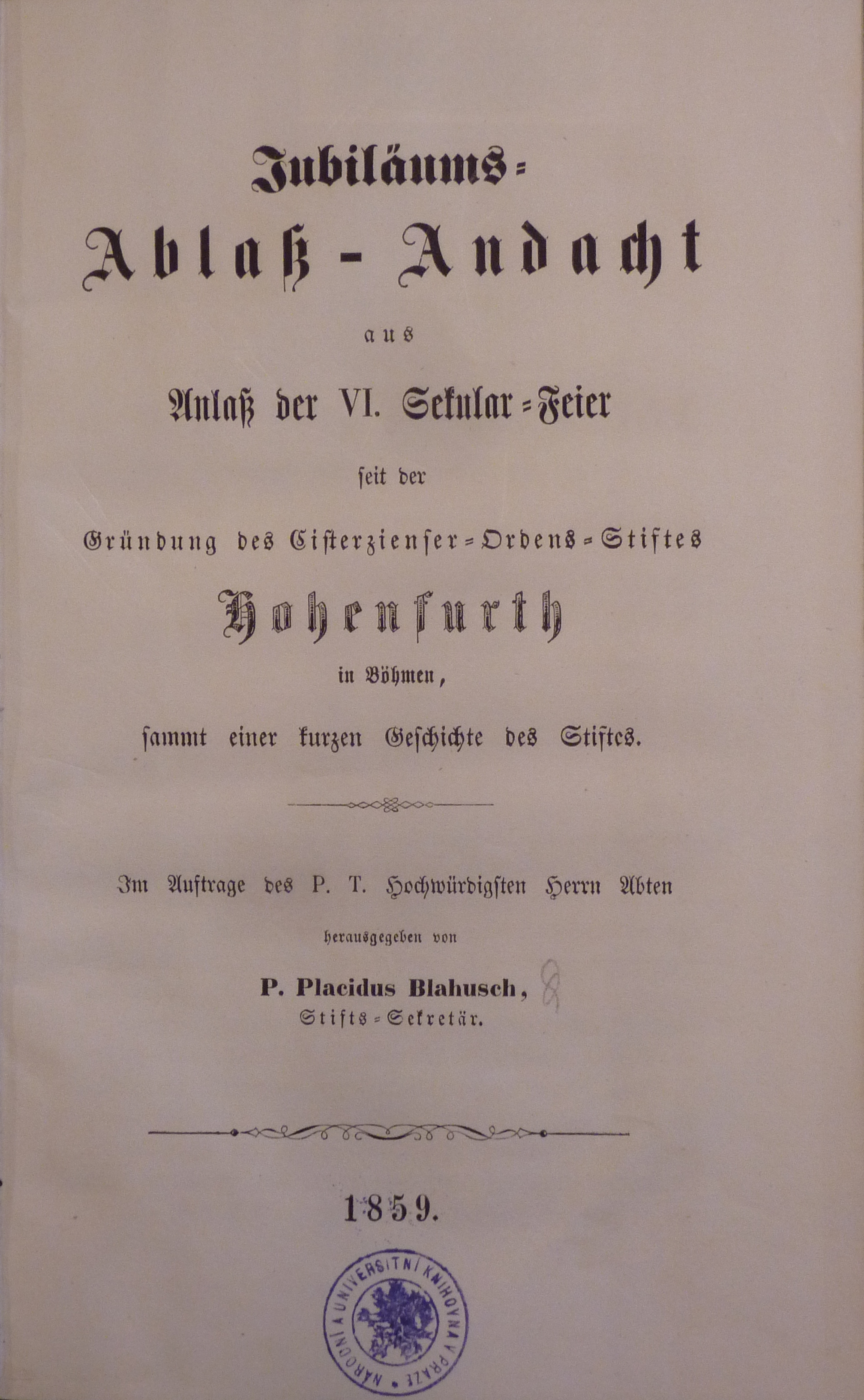 Titelblatt des Buchs Jubiläums-Ablaß-Andacht aus Anlaß der VI. Sekular-Feier seit der Gründung des Cisterzienser-Ordens-Stiftes Hohenfurth in Böhmen, sammt einer kurzen Geschichte des Stiftes ausgegeben im 1859 von Placidus Blahusch in Linz